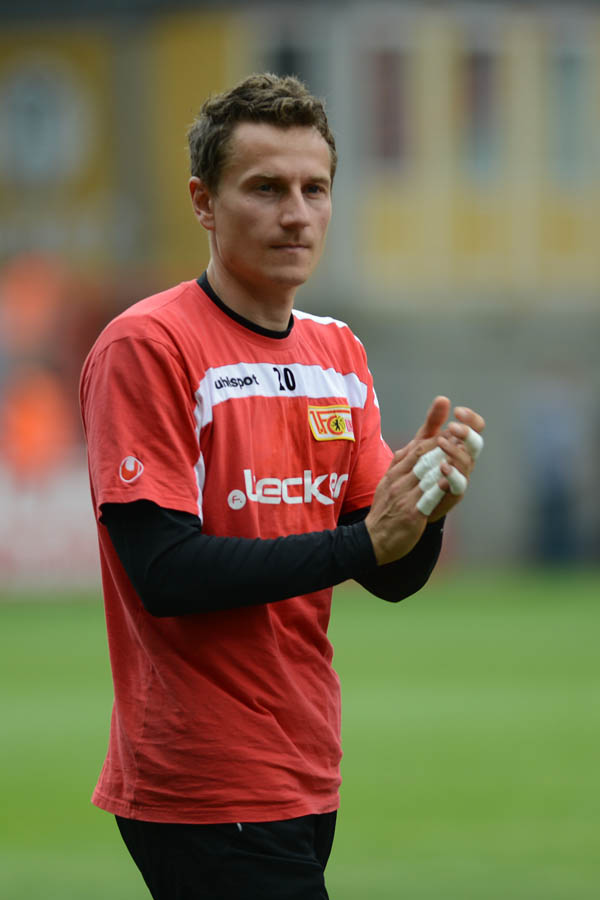 Ersatztorwart Jan Glinker beklatscht die Unionfans.